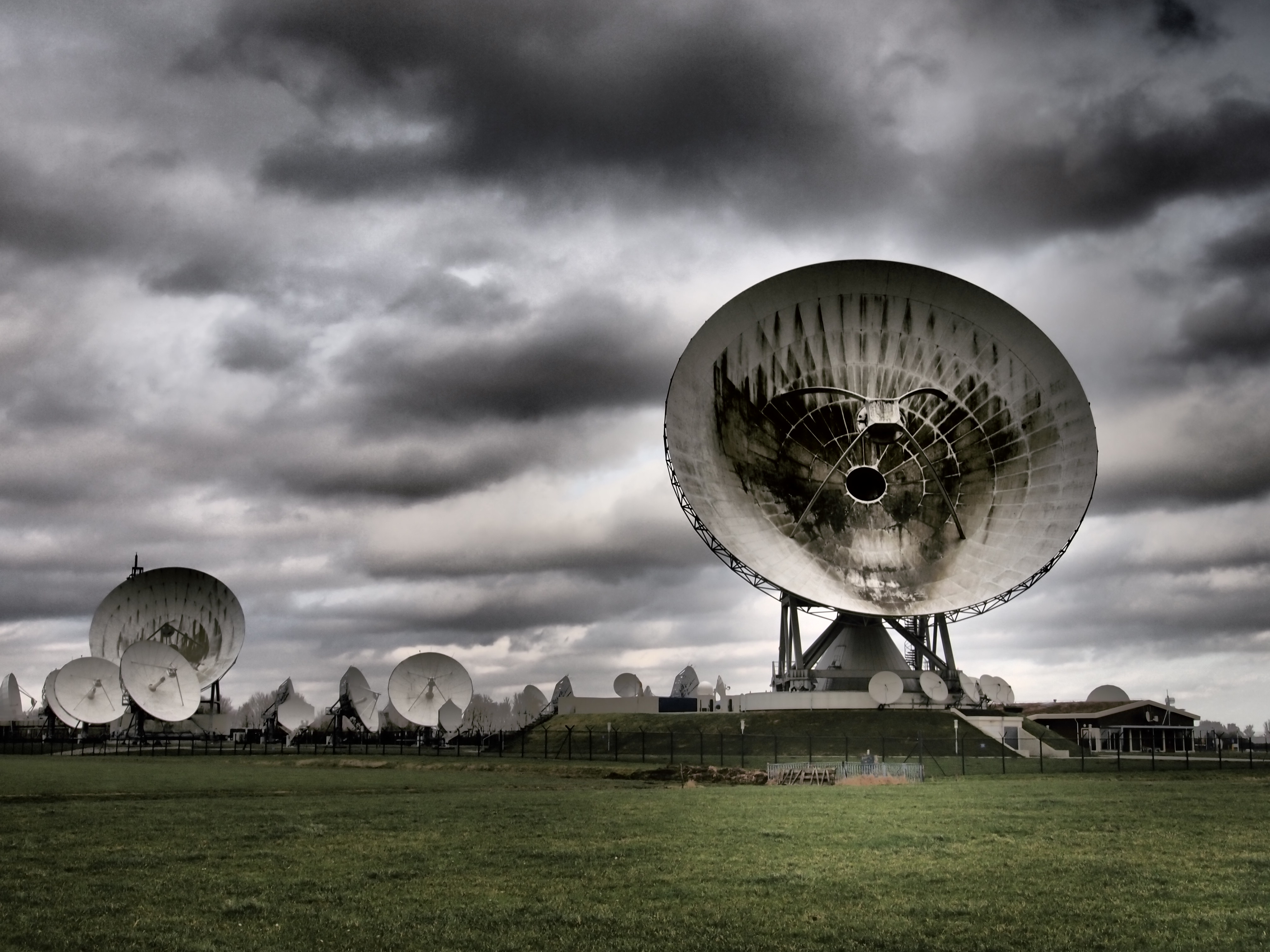 De oren van Burum